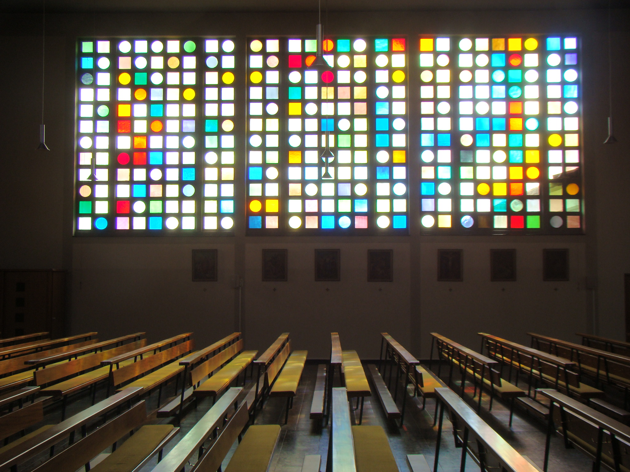 Eppingen-Richen, kath. Kirche Mariä Geburt